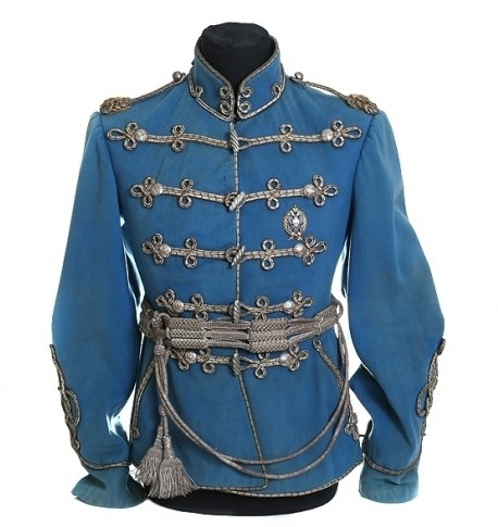 Мундир ротмистра 13-го Нарвского гусарского полка, из коллекции Андрея Болдырева, Самара.